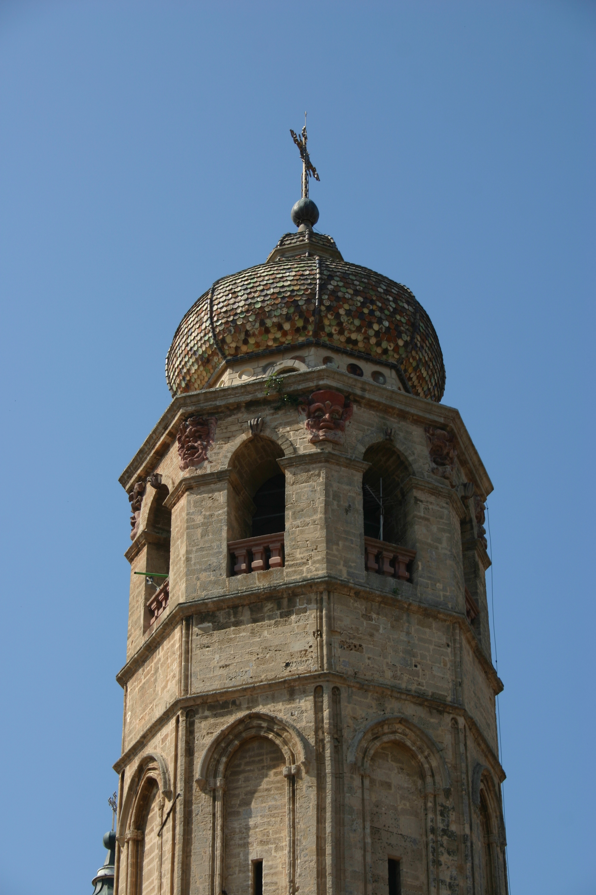 Kirchturmspitze des Doms von Oristano, Sardinien